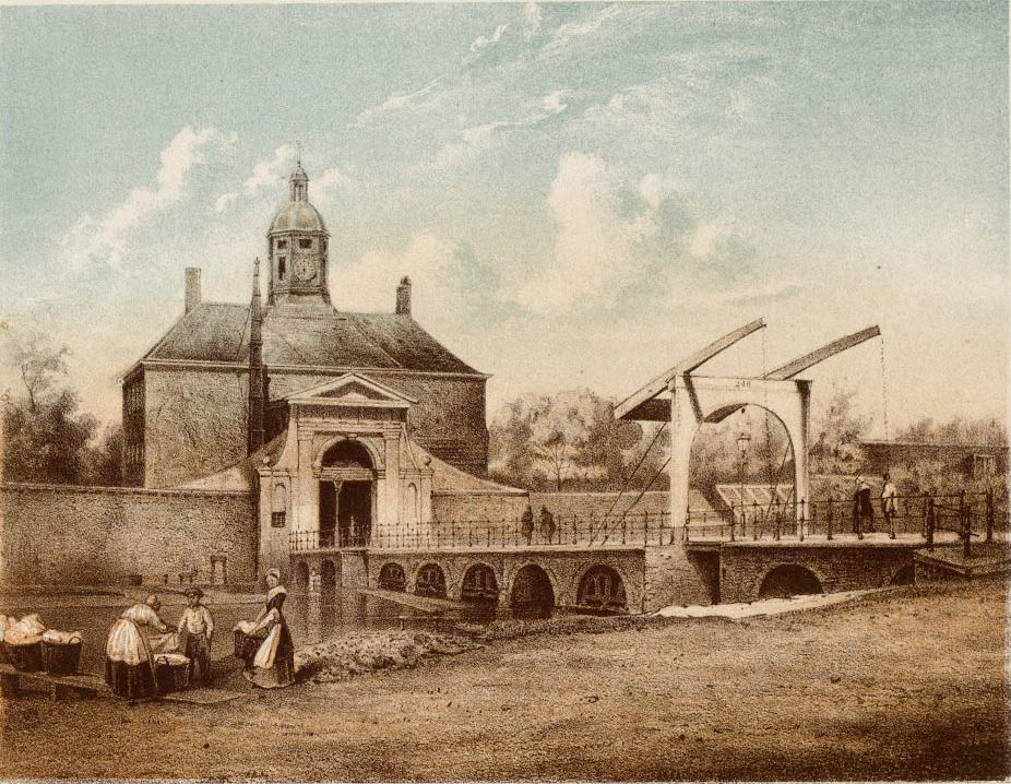 De Utrechtsepoort, gezien van de overzijde van de Singelgracht. Links op de voorgrond zijn wasvrouwen aan het werk. Litho met steunkleuren, handgekleurd.